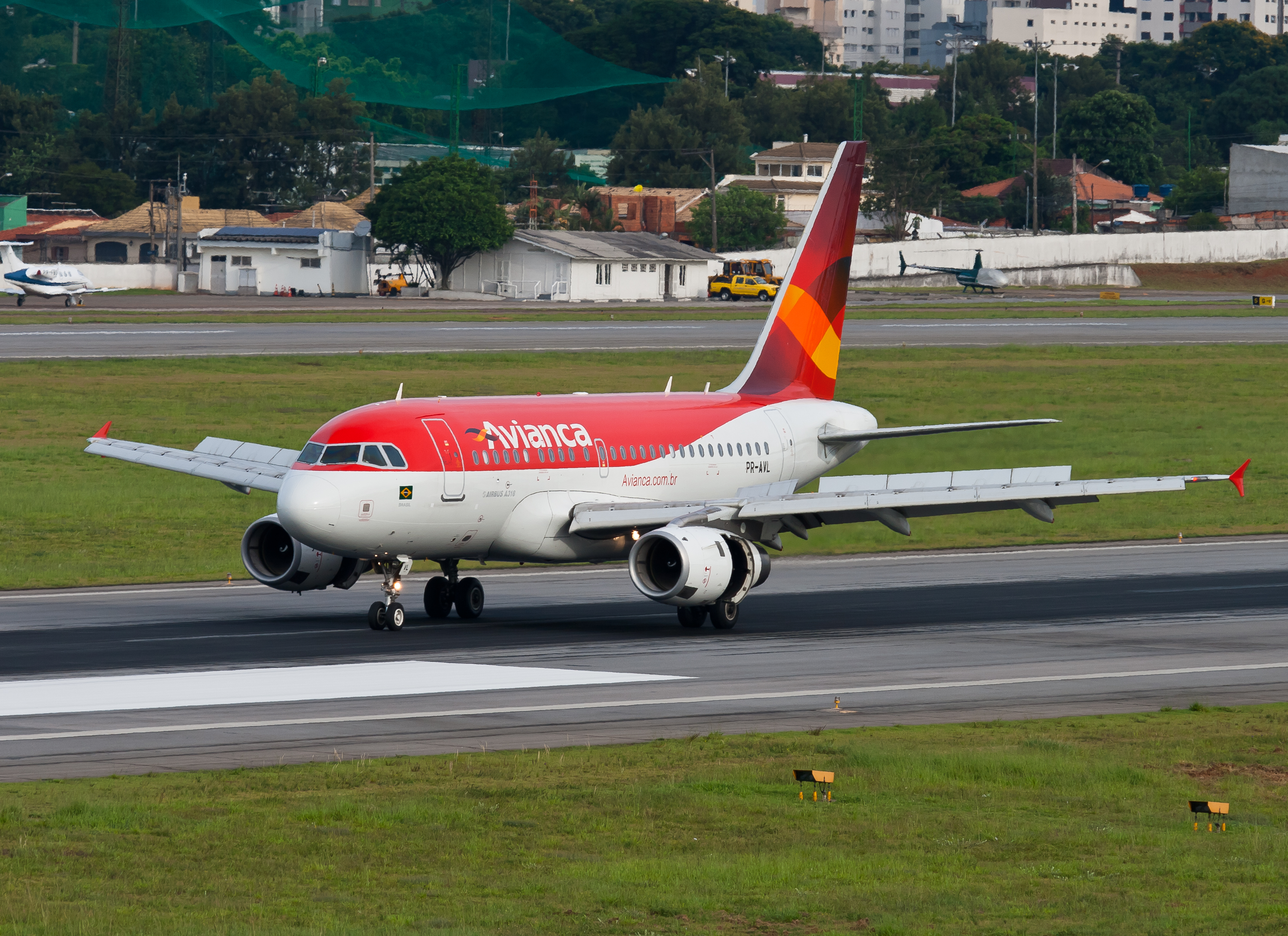 Just Landed